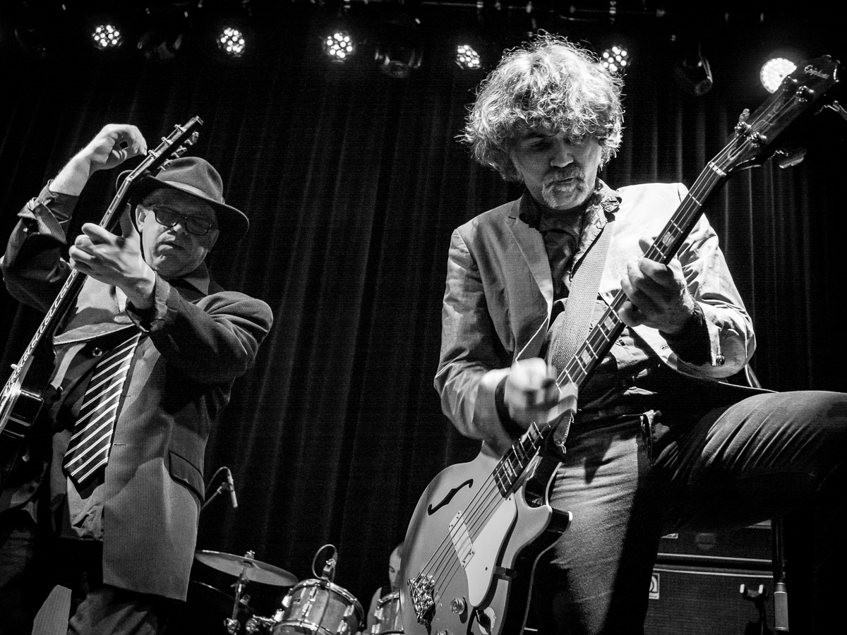 Concierto Siniestro Total en las Armas Zaragoza Oscar G. Avendaño y Julián Hernández